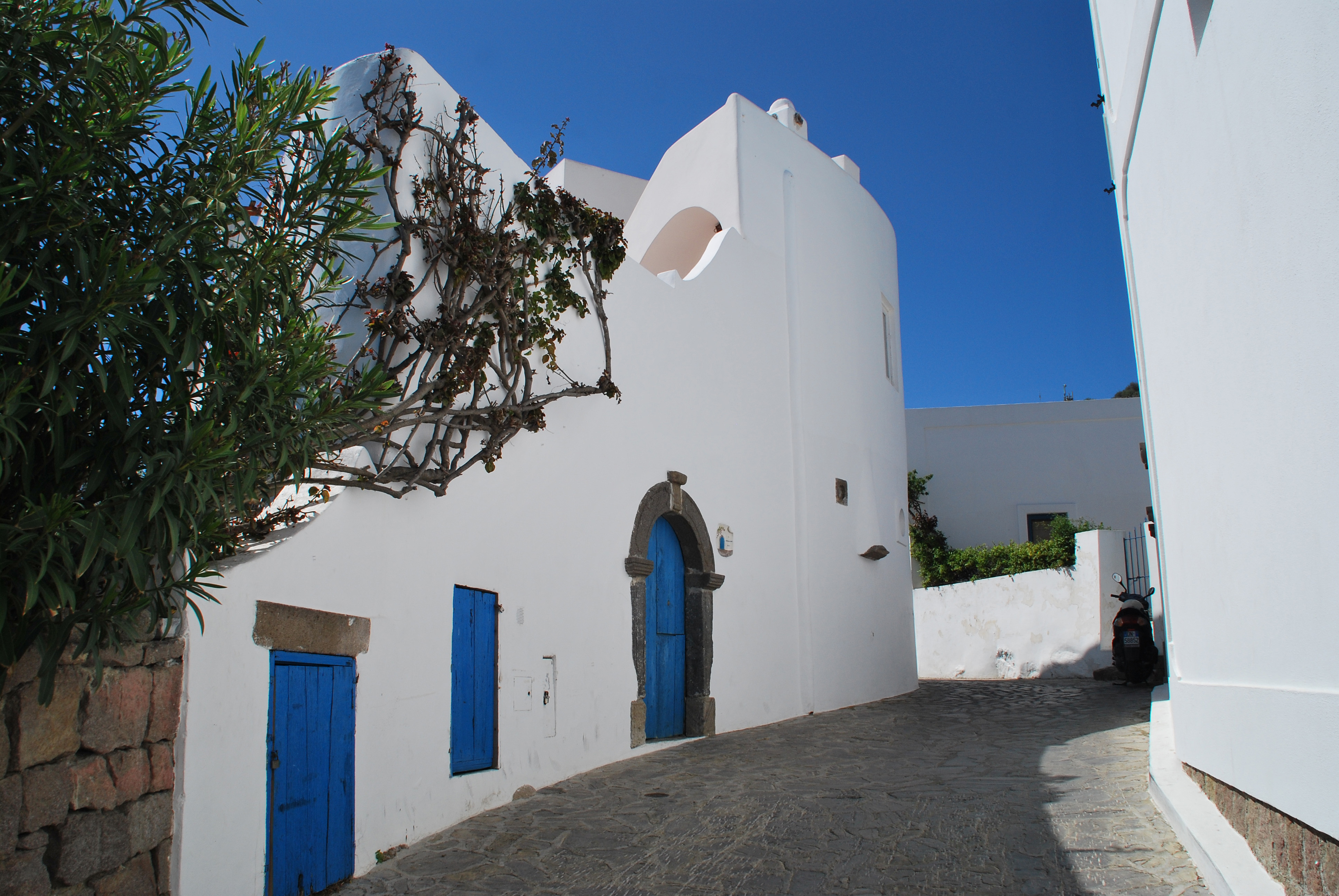 Panarea